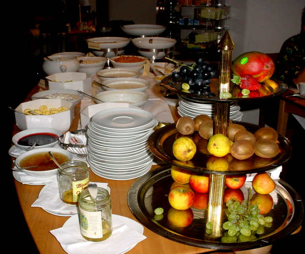 Frühstücksbüffet beim Brunch: Zerealien, Joghurt, Obst. Eigenes Foto, gemeinfrei. The weaver 14:54, 21. Mär 2004 (CET)